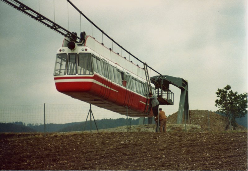 Aerobus Test Installation in Dietlikon, Switzerland